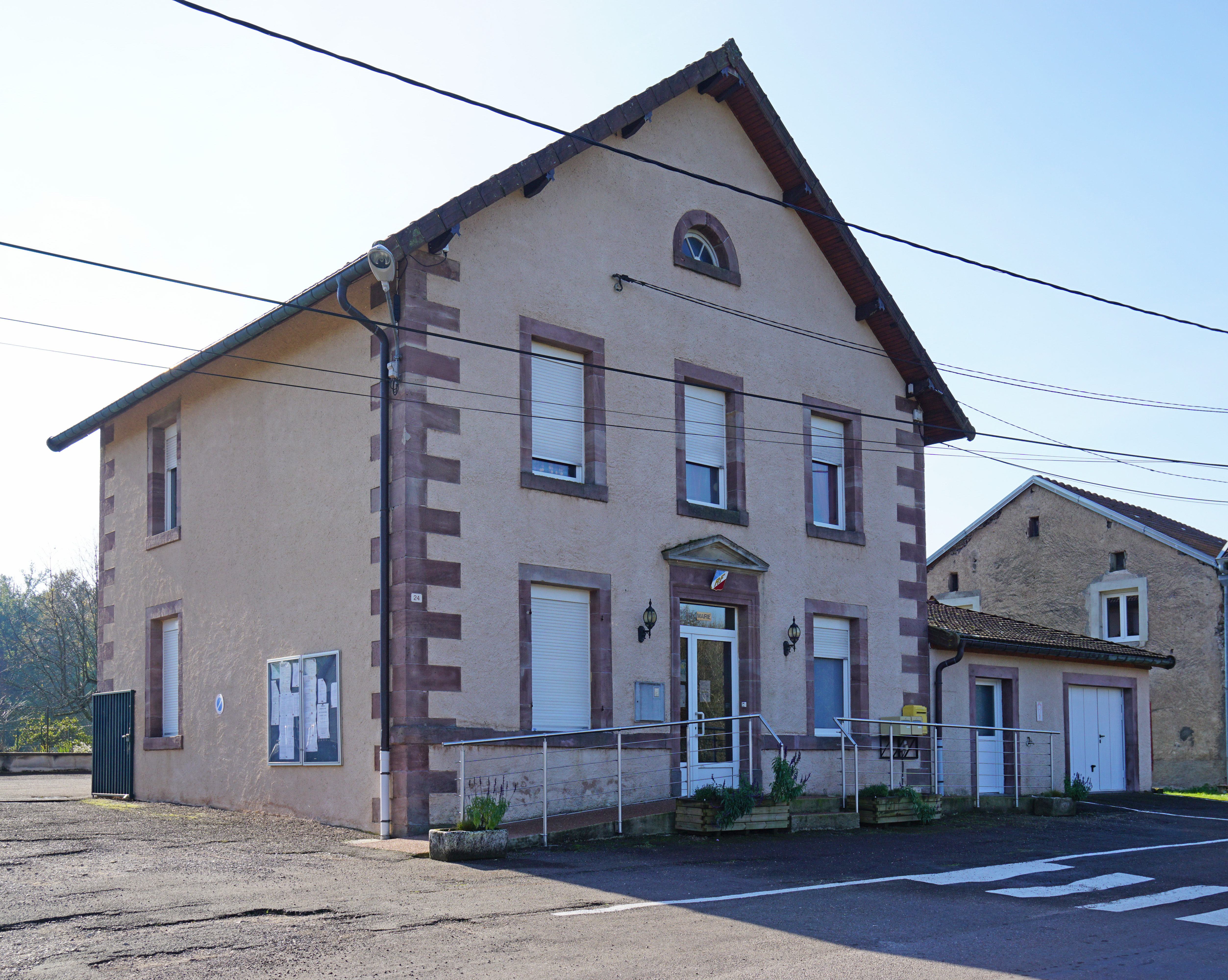 La mairie de Montessaux.